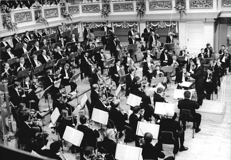 Berlin, Neujahrskonzert im Schauspielhaus ADN-ZB Reiche 1.1.87 Berlin: Jubiläum- Am Abend des Neujahrstages werden die Feierlichkeiten zum 750jährigen Bestehen Berlins mit einem festlichen Konzert der Staatskapelle Berlin, dirigiert von Klaus Peter Flor (Foto), Heinz Frieke, Rolf Reuter, Heinz Rögner und Kurt Sanderling, im Schauspielhaus am Platz der Akademie eröffnet. (Foto von der Generalprobe)